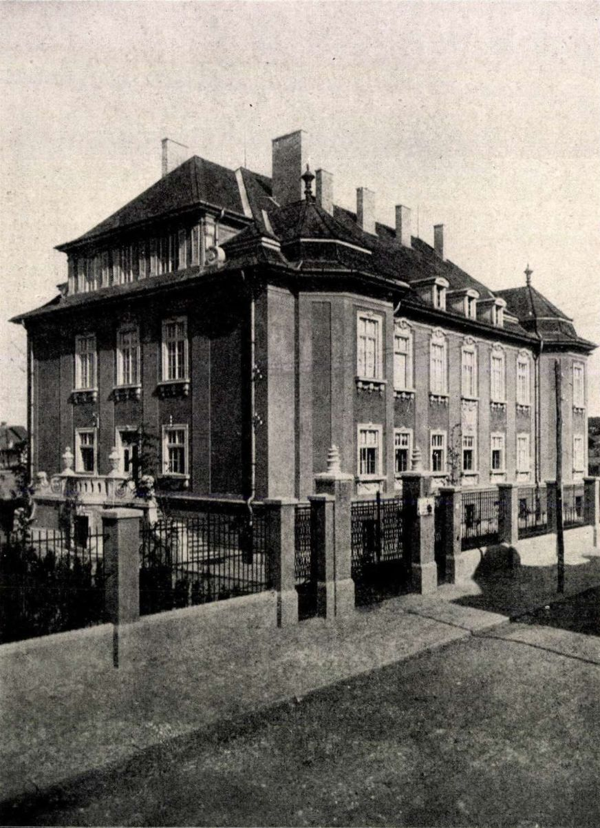 Szófiai magyar követségi palota épülete, Bulgária (tervezte Wälder Gyula, felépült 1927-ben)